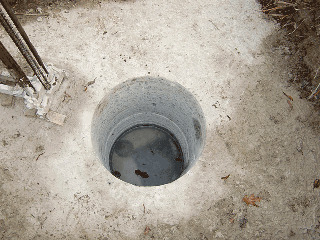 Kernbohrung in Betonfundament